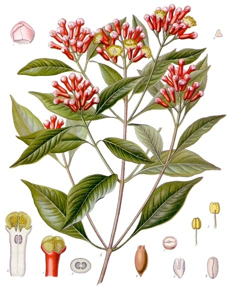 Gewürznelkenbaum. A Blüthenzweig, natürl. Grösse; 1 Blüthenknospe, während des Aufblühens, mit abgehobenen Blumenblättern (links oben), vergrössert; 2 Blüthenknospe im Längsschnitt, desgl.; 3 Staubgefässe von verschiedenen Seiten, desgl.; 4 Pollen, desgl.; 5 Fruchtknoten im Querschnitt, desgl.; 6 Frucht, natürl. Grösse; 7 dieselbe im Querschnitt, mit Würzelchen und Samenlappen, desgl.; 8 Embryo, desgl.; 9 Ein Samenlappen mit Würzelchen, desgl.